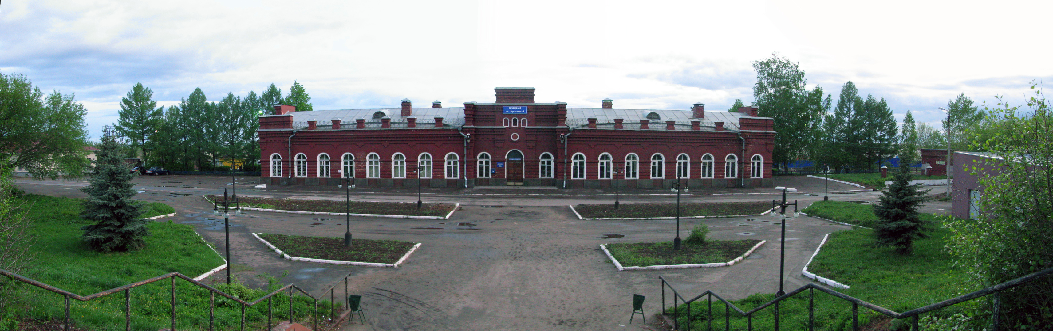 Вокзал станции Арзамас-I